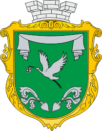 Герб смт Радісне, Одеська область